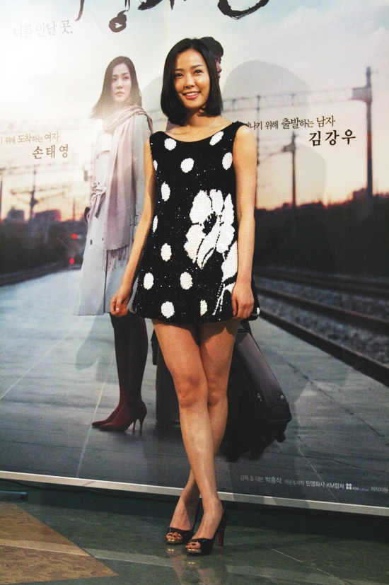 경의선 재개봉 시사회